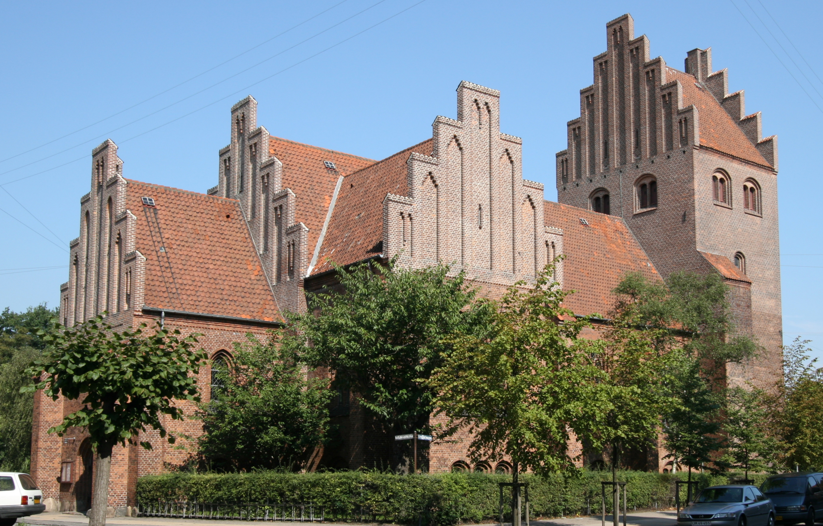 Kildevældskirken in Copenhagen, Denmark.